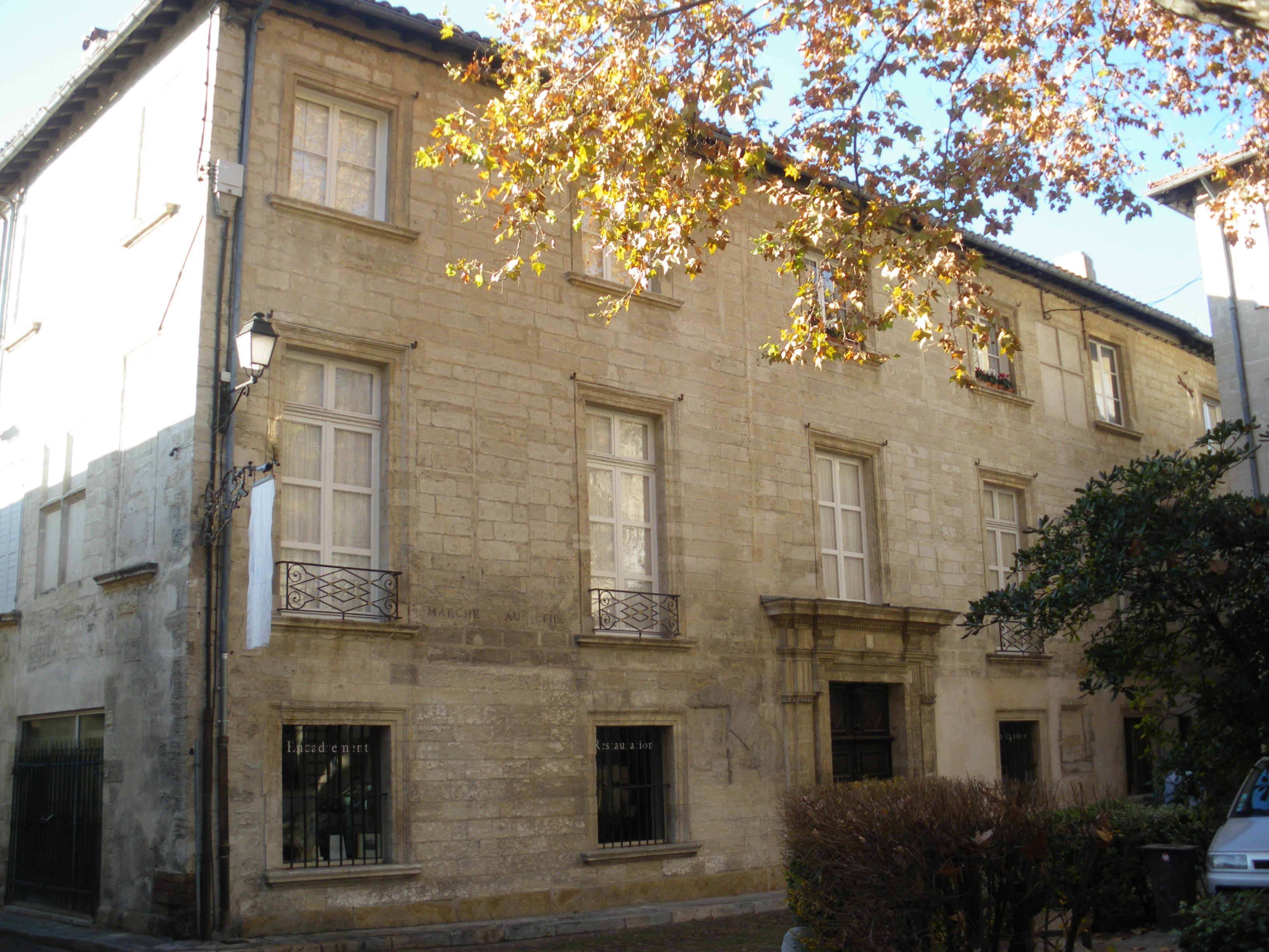 Place du Plan de Lunel, à Avignon